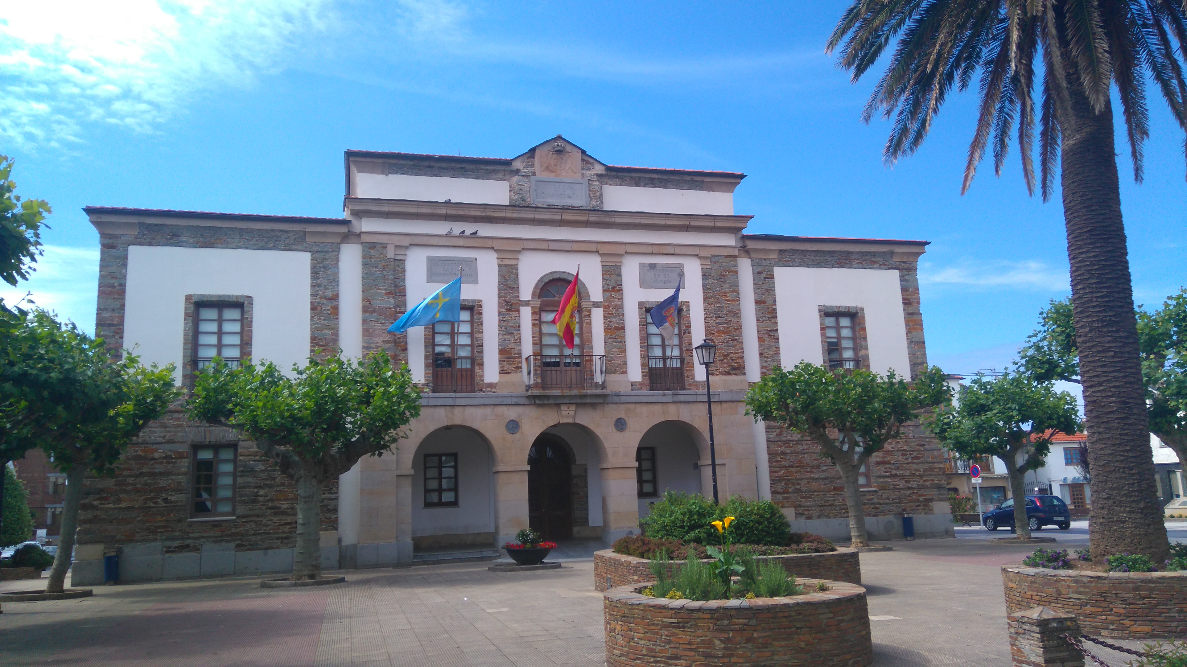 Ayuntamiento de Tapia de Casariego, España.